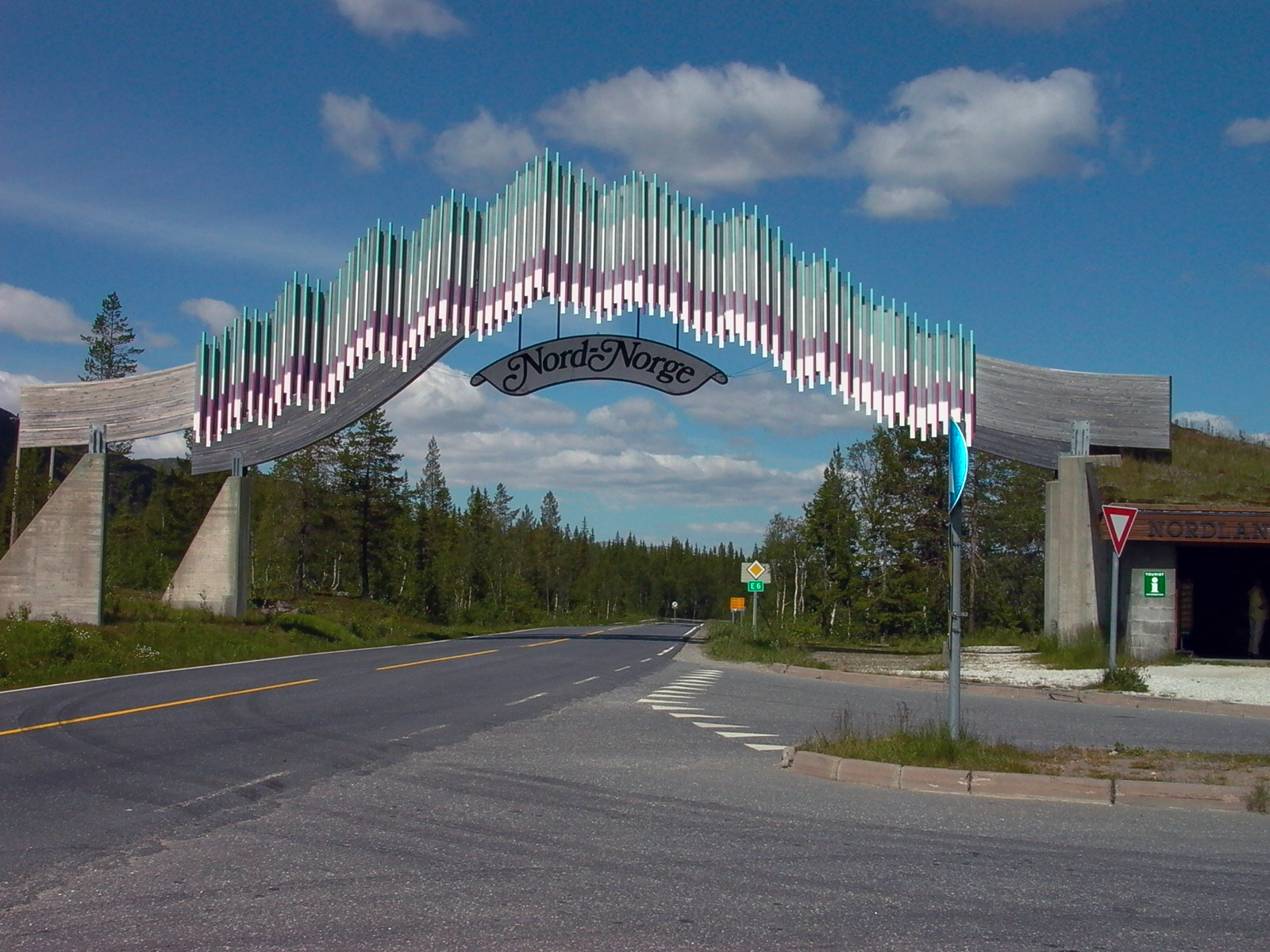 Grensen mellom Nord Trønderlag fylke og Nordland fylke. 310 km fra Trondheim og 100 km fra Mosjøen. 310,5 m over havet.